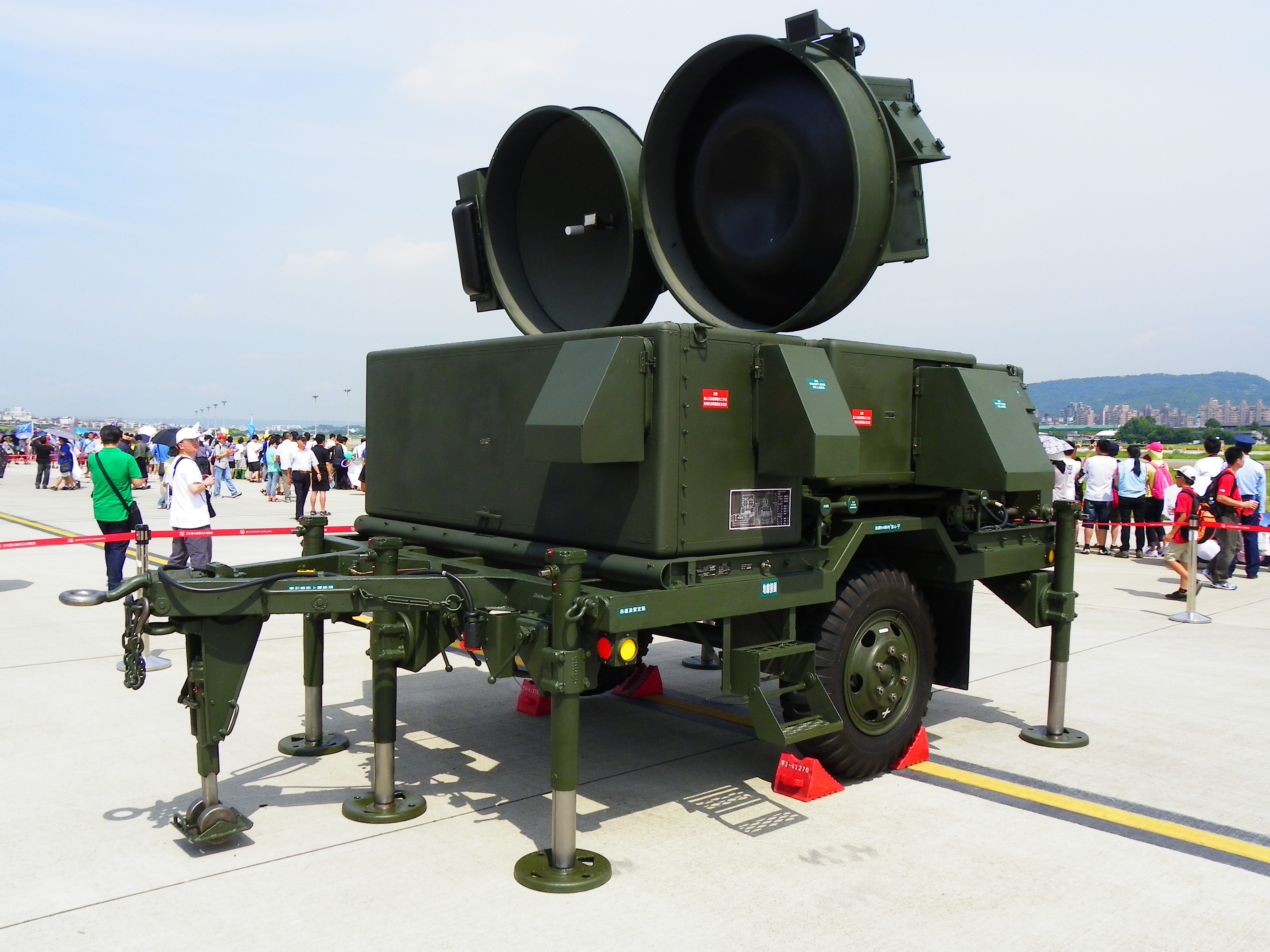 2011年8月13日空軍松山基地營區開放活動中，展示之鷹式防空飛彈高功率追蹤雷達。